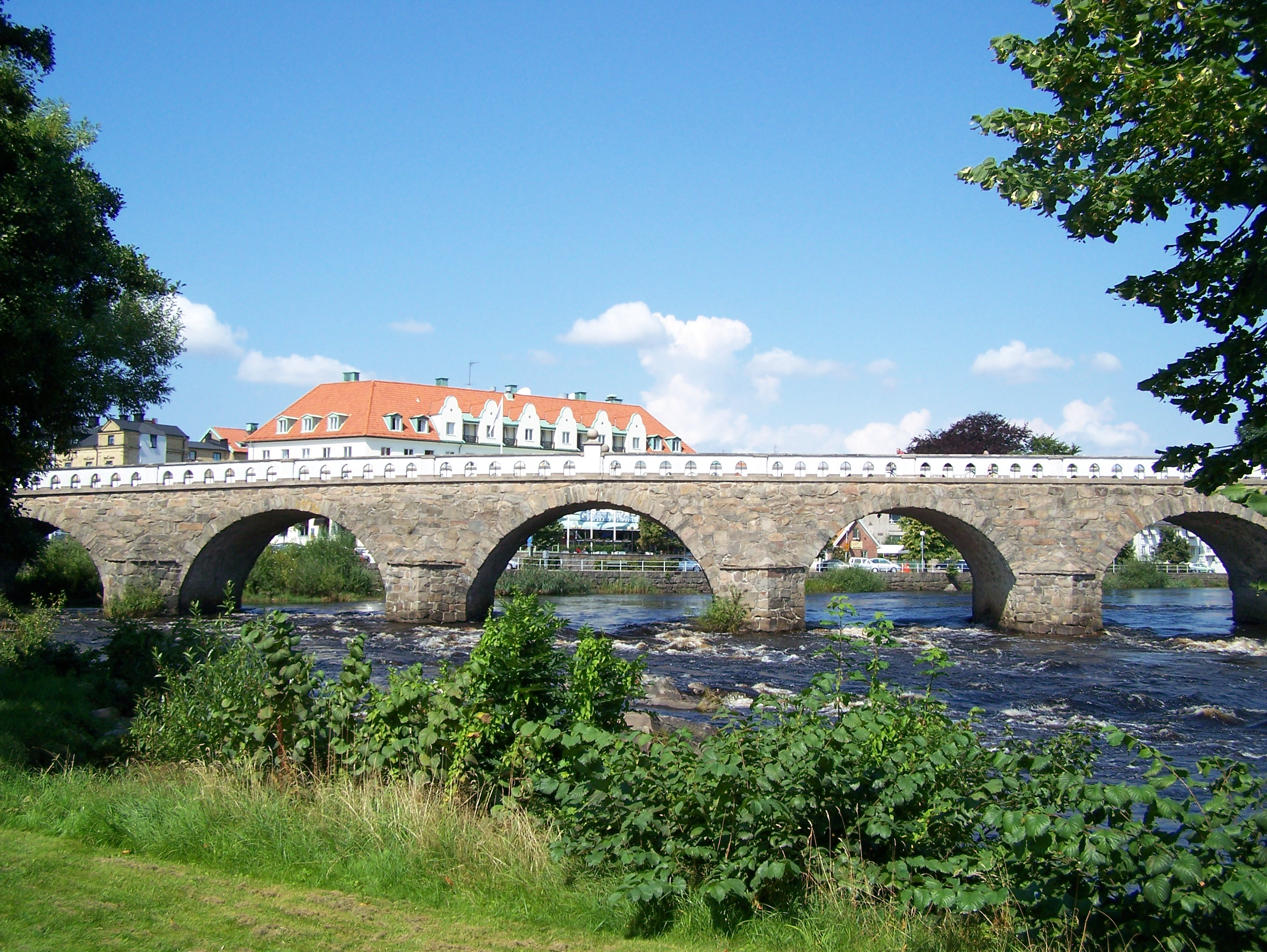 Tullbron, Falkenberg, Sverige.